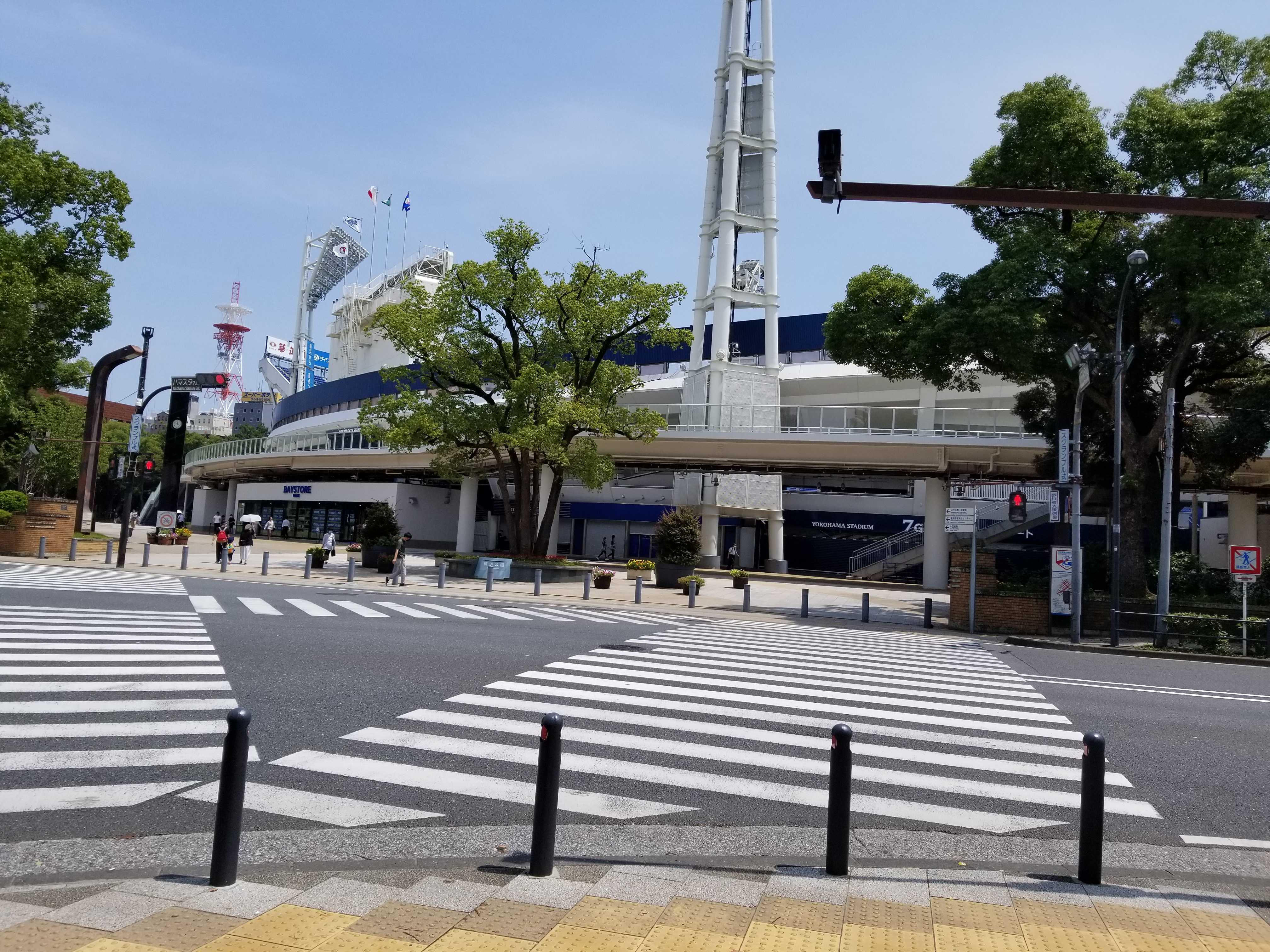 公園内の横浜スタジアム